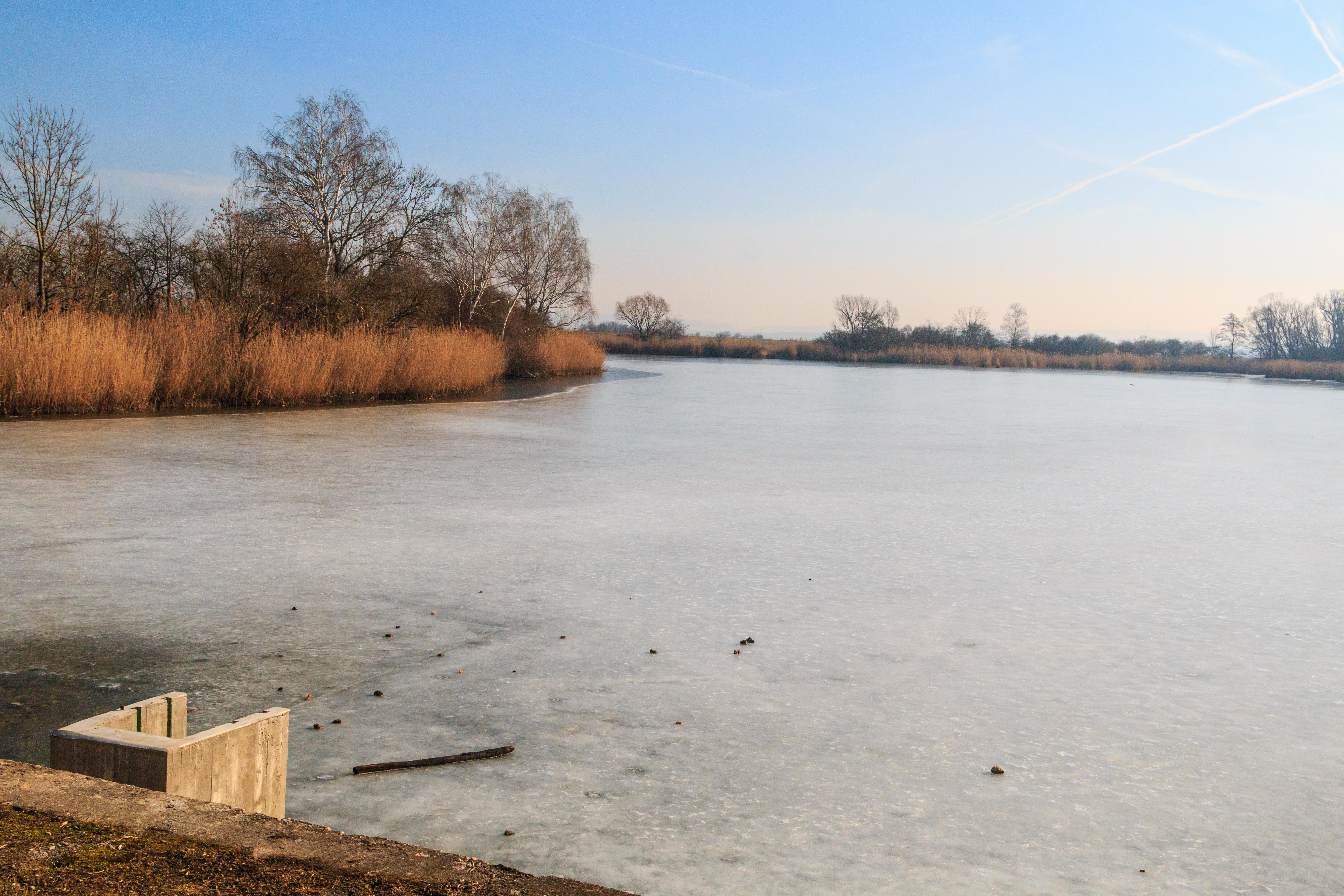 Rybník Slatinka u Malé Strany u Chotěšic Project: Vodstvo. Ticket: 1711.